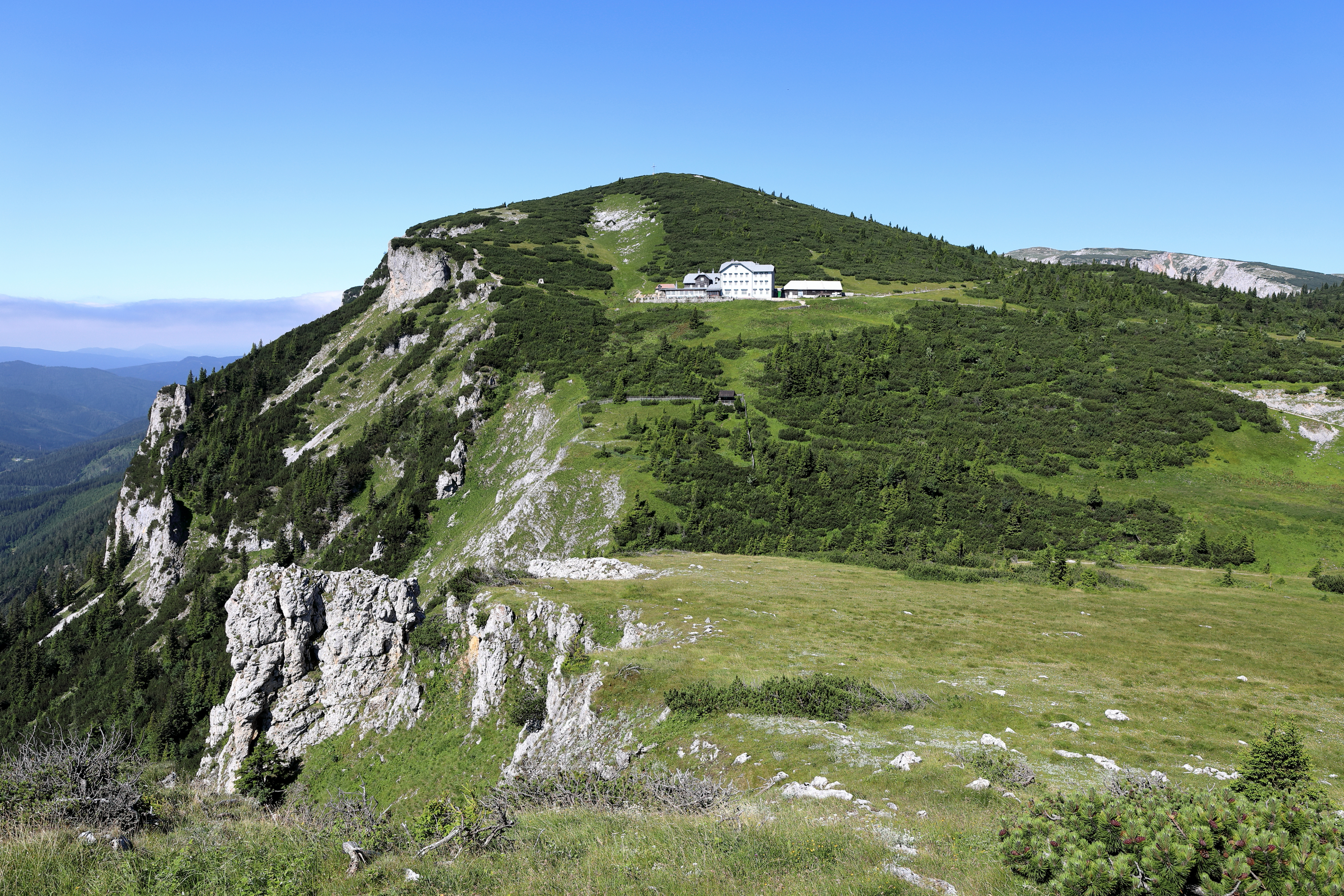 Ost-Fernansicht des Otto-Schutzhauses auf der Rax in der niederösterreichischen Marktgemeinde Reichenau an der Rax und im Hintergrund der 1737 m hohe Jakobskogel mit einem Gipfelkreuz.Das Schutzhaus wurde von der Sektion Reichenau des Deutschen und Österreichischen Alpenvereins errichtet und 1893 eröffnet (das kleinere Gebäude links mit den Holzschindeln). Unter Camillo Kronich, der fast ein halbes Jahrhundert als Hüttenwirt das Schutzhaus betrieb, wurde 1908/1909 nordseitig ein zweistöckiger Trakt mit 22 Schlafzimmern angebaut und 1927 erfolgte der Veranda-Zubau.